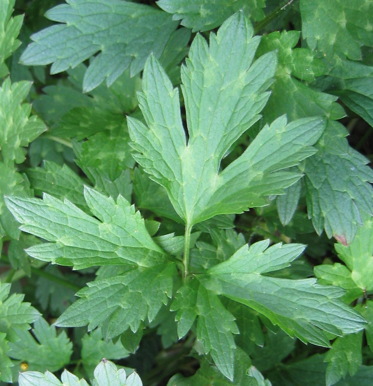 Blad van de kruipende boterbloem (Ranunculus repens). Eigen foto